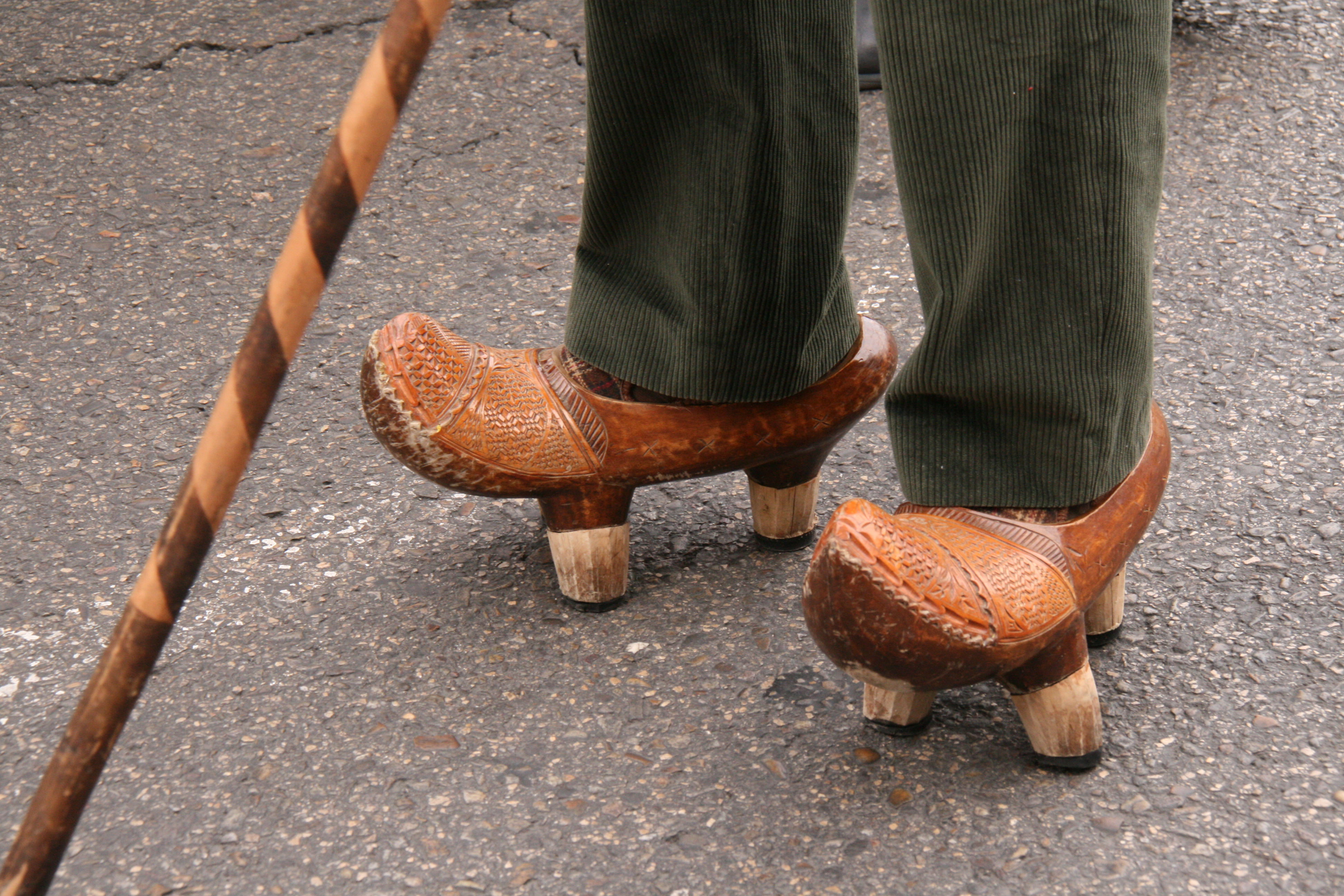 Albarcas de pastores cántabros